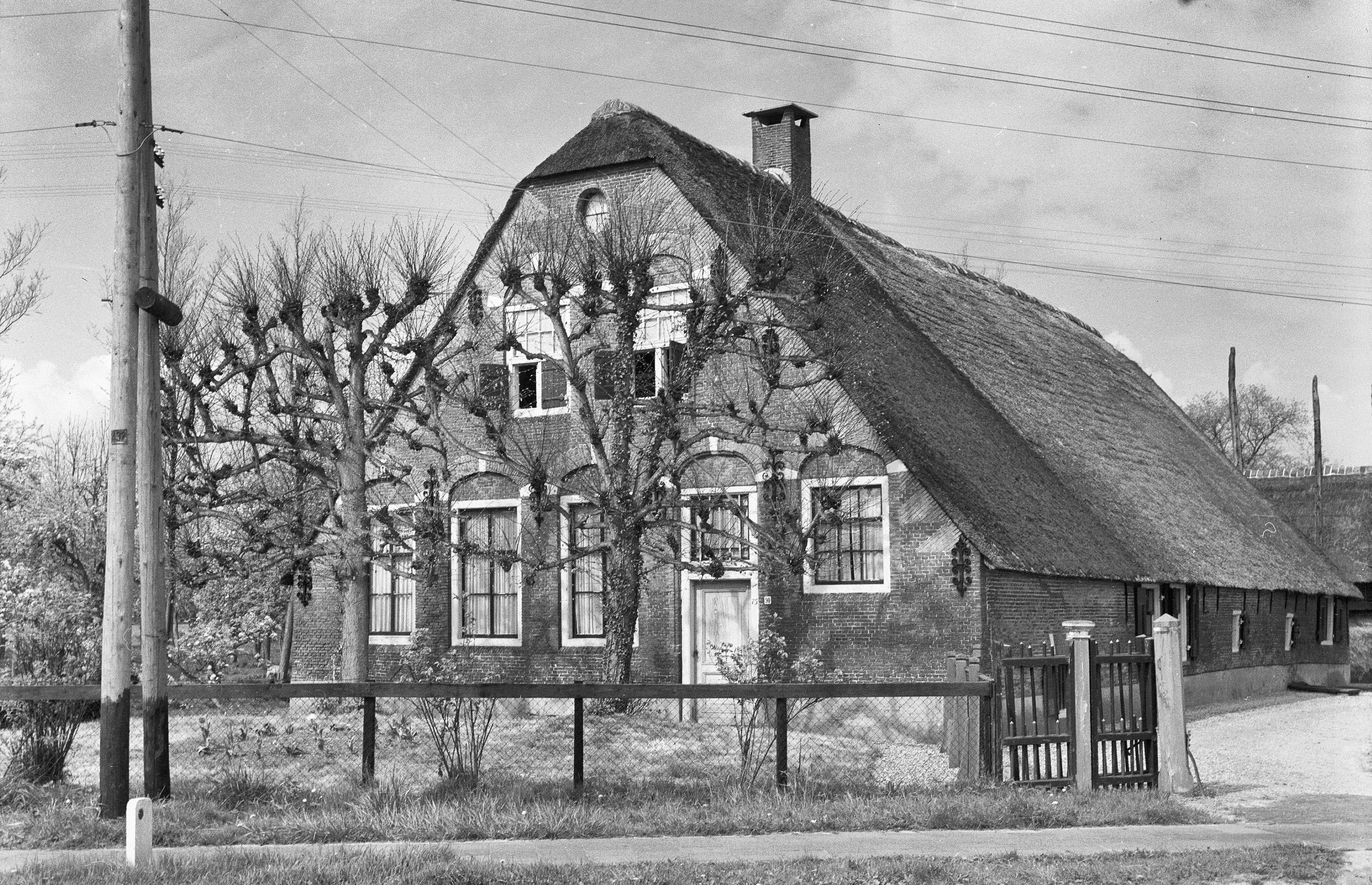 Diversen: 90, voorgevel